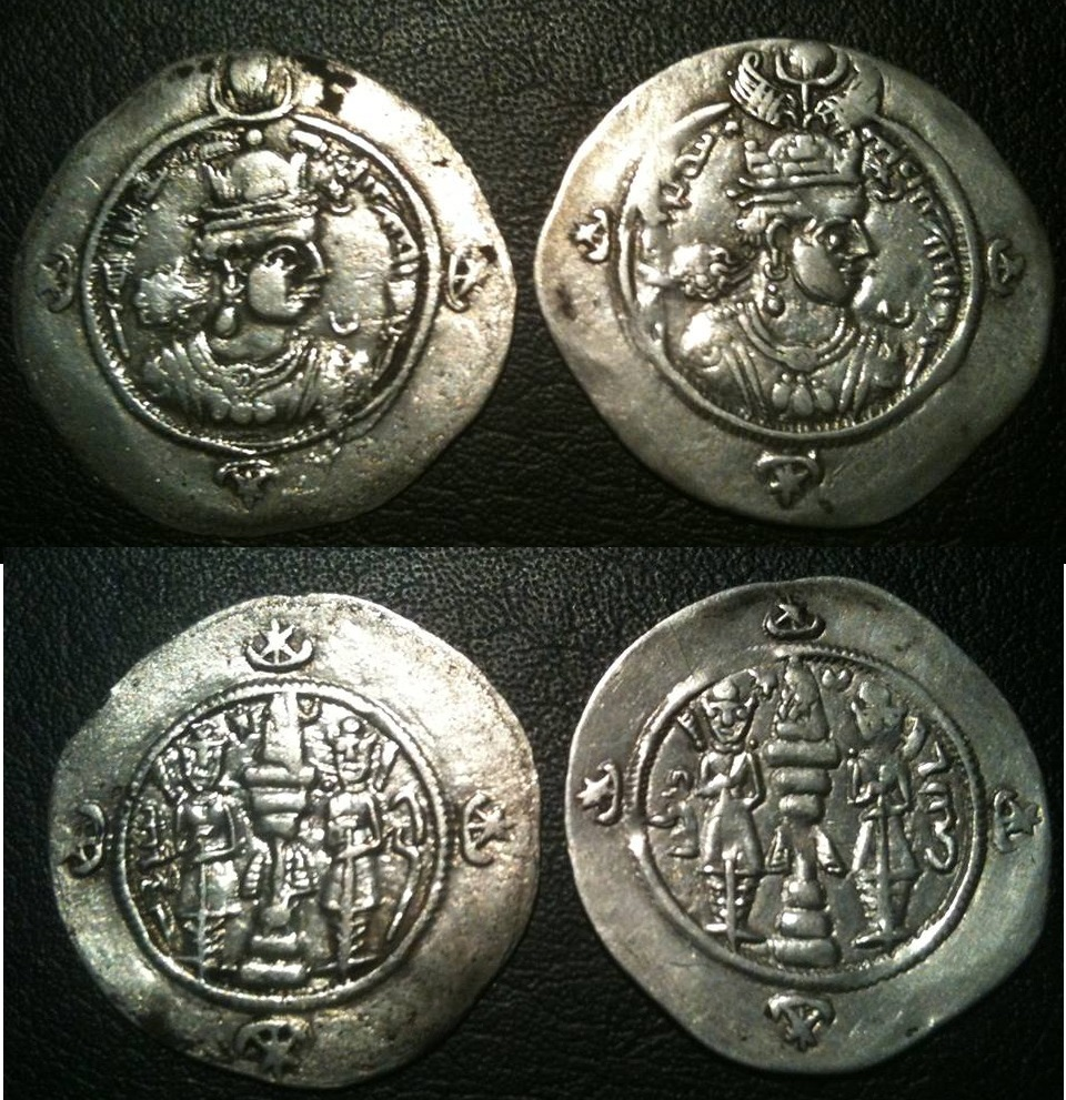 سکه اردشیر سوم ساسانی